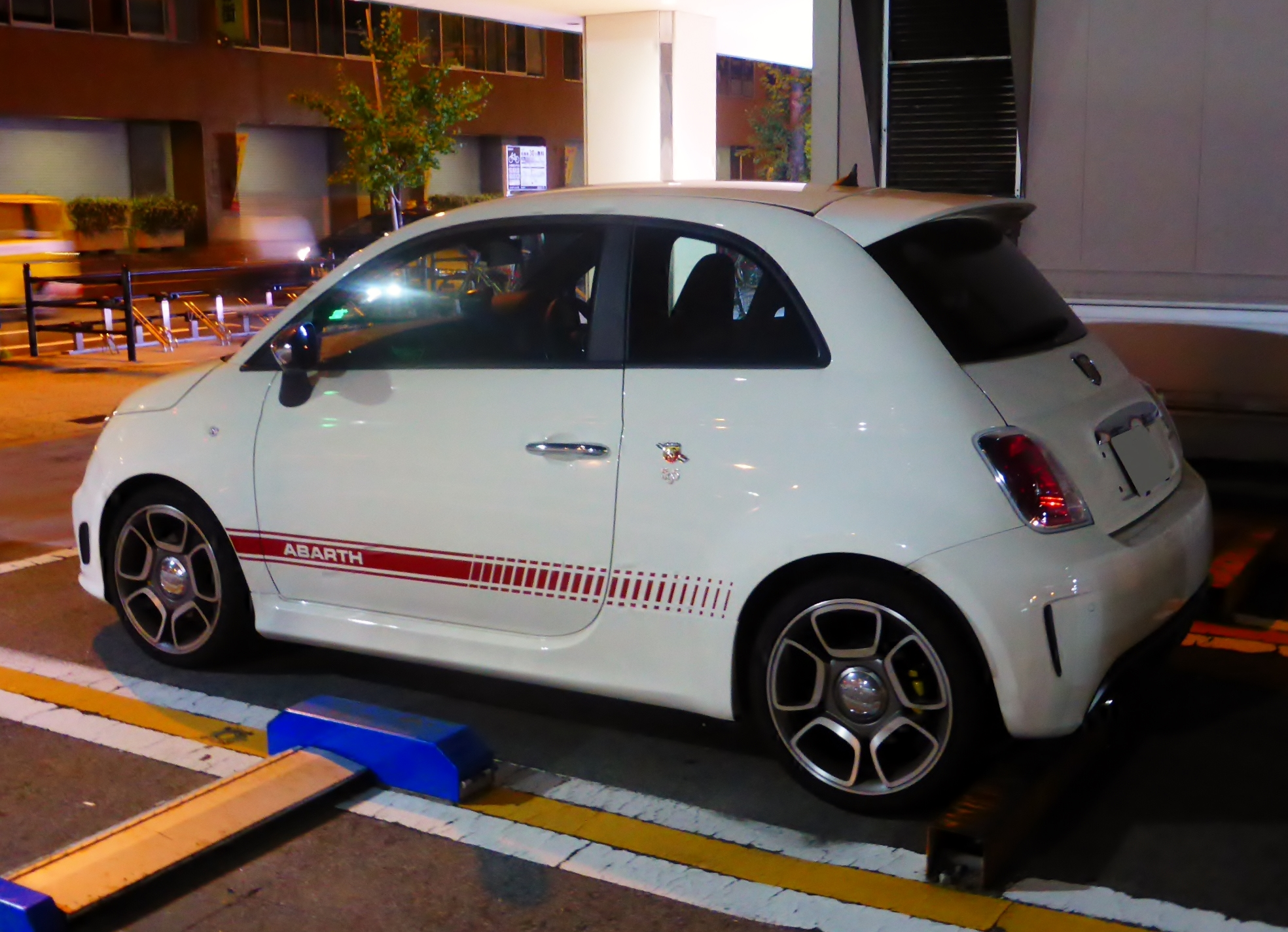 白いアバルト・500をリアから撮影。